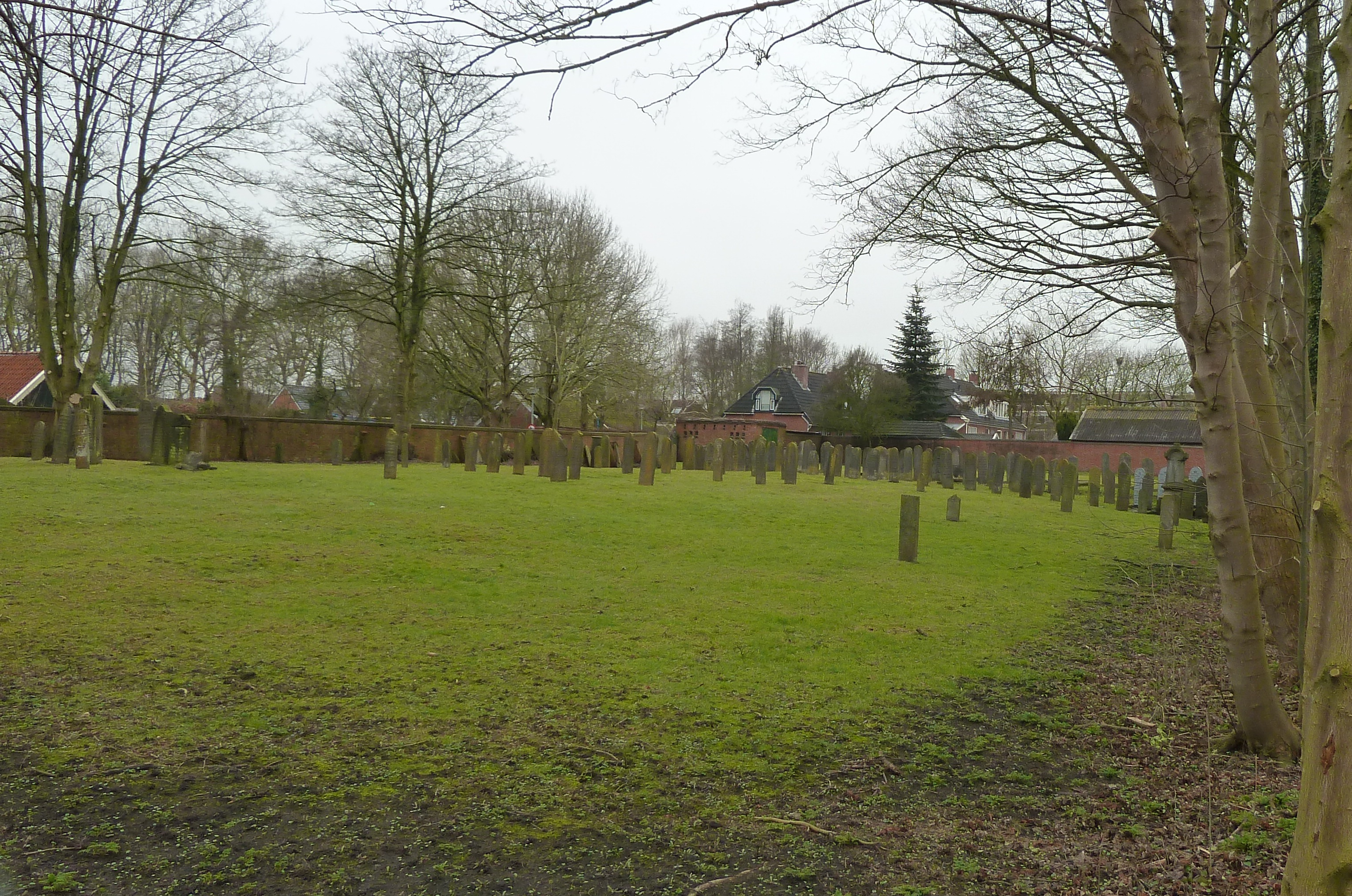 Kerkhof van het Augustijnenklooster op de wierde in Appingedam